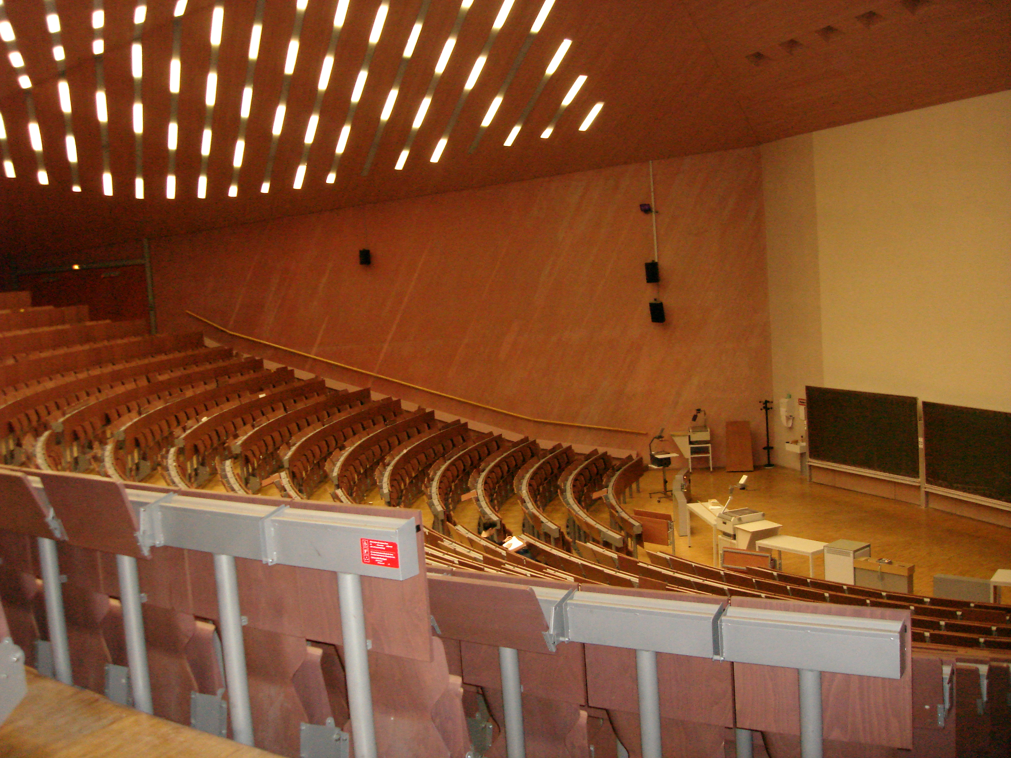 Hörsaal V47.01, Universität Stuttgart, Vaihingen date: 03.02.2006 by: Christoph Hoffmann